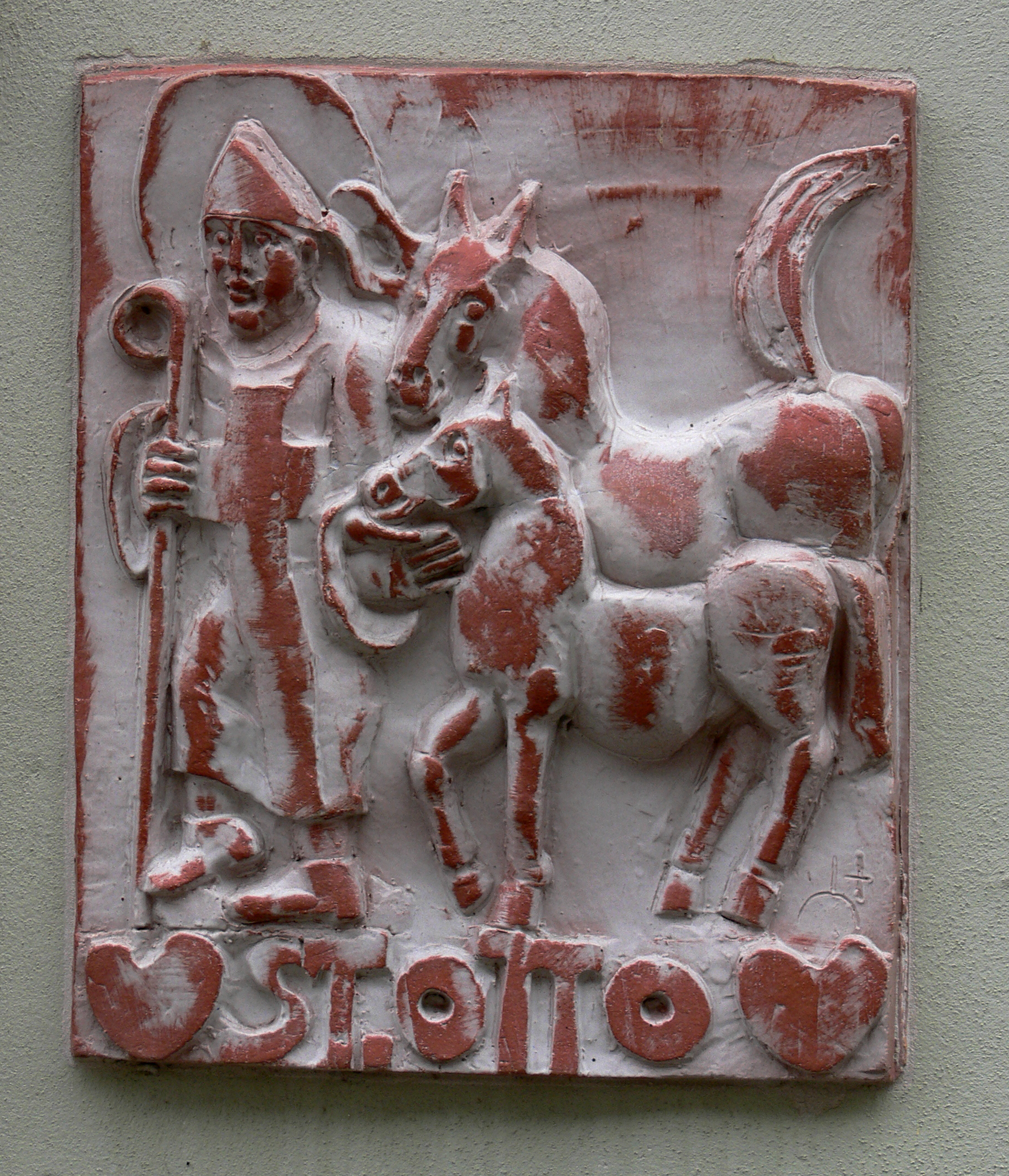 Bamberg, Domstraße 9c, Relief "St. Otto" (von Bamberg)